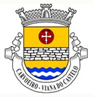 Carvoeiro